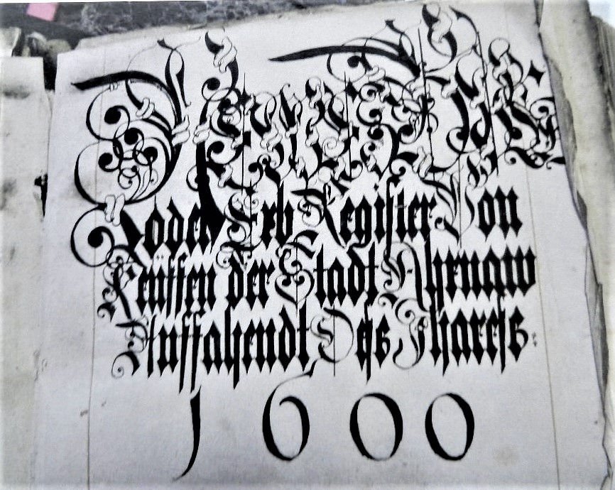 Inschrift des Arnauer Stadtbuches von 1600